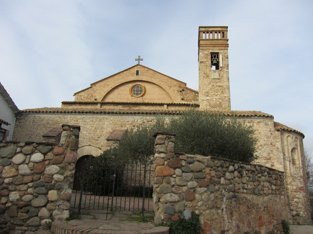 Vista frontal de l'església romànica de Sant Salvador de Polinyà.